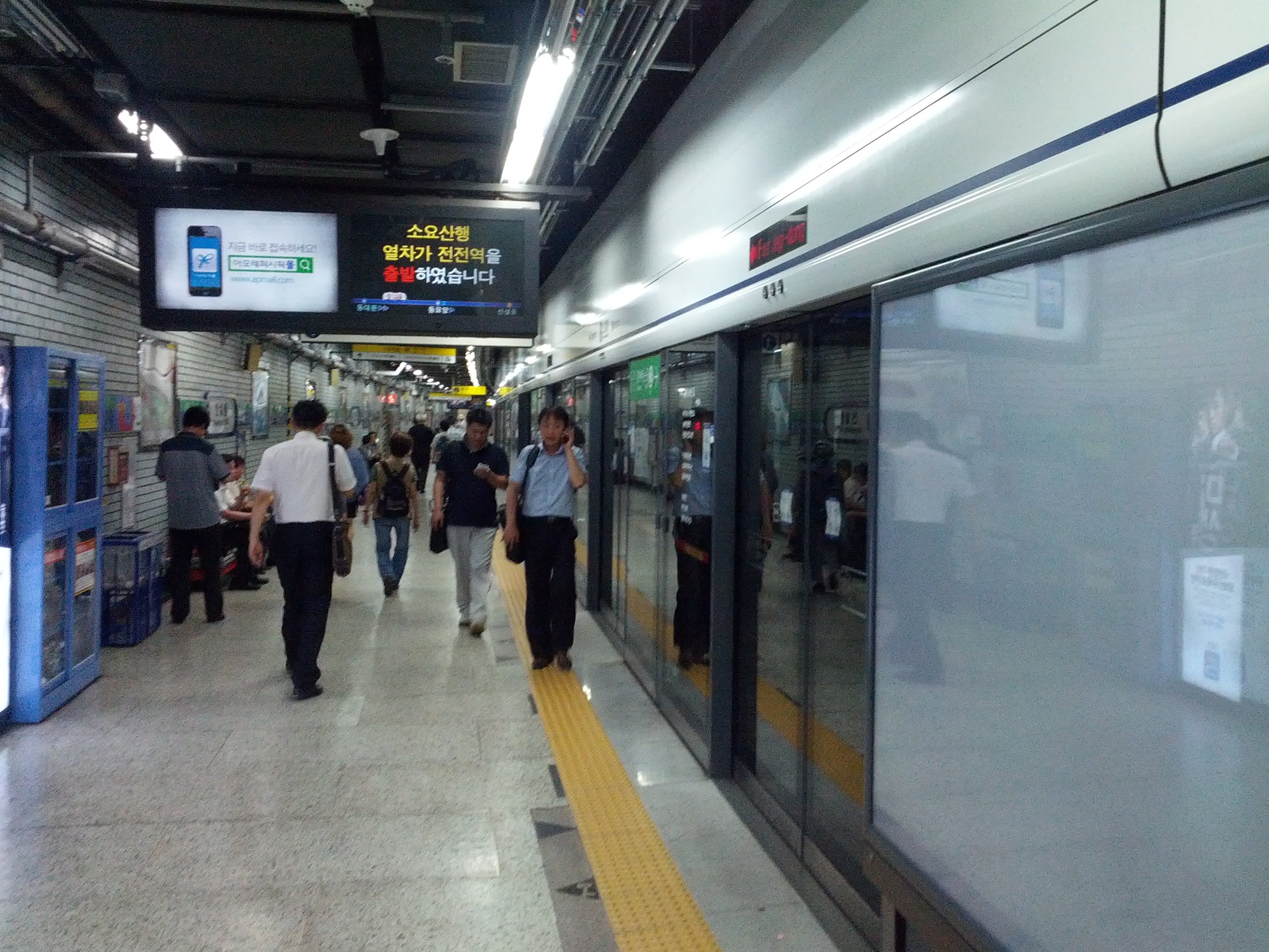 1호선 신설동역 승강장